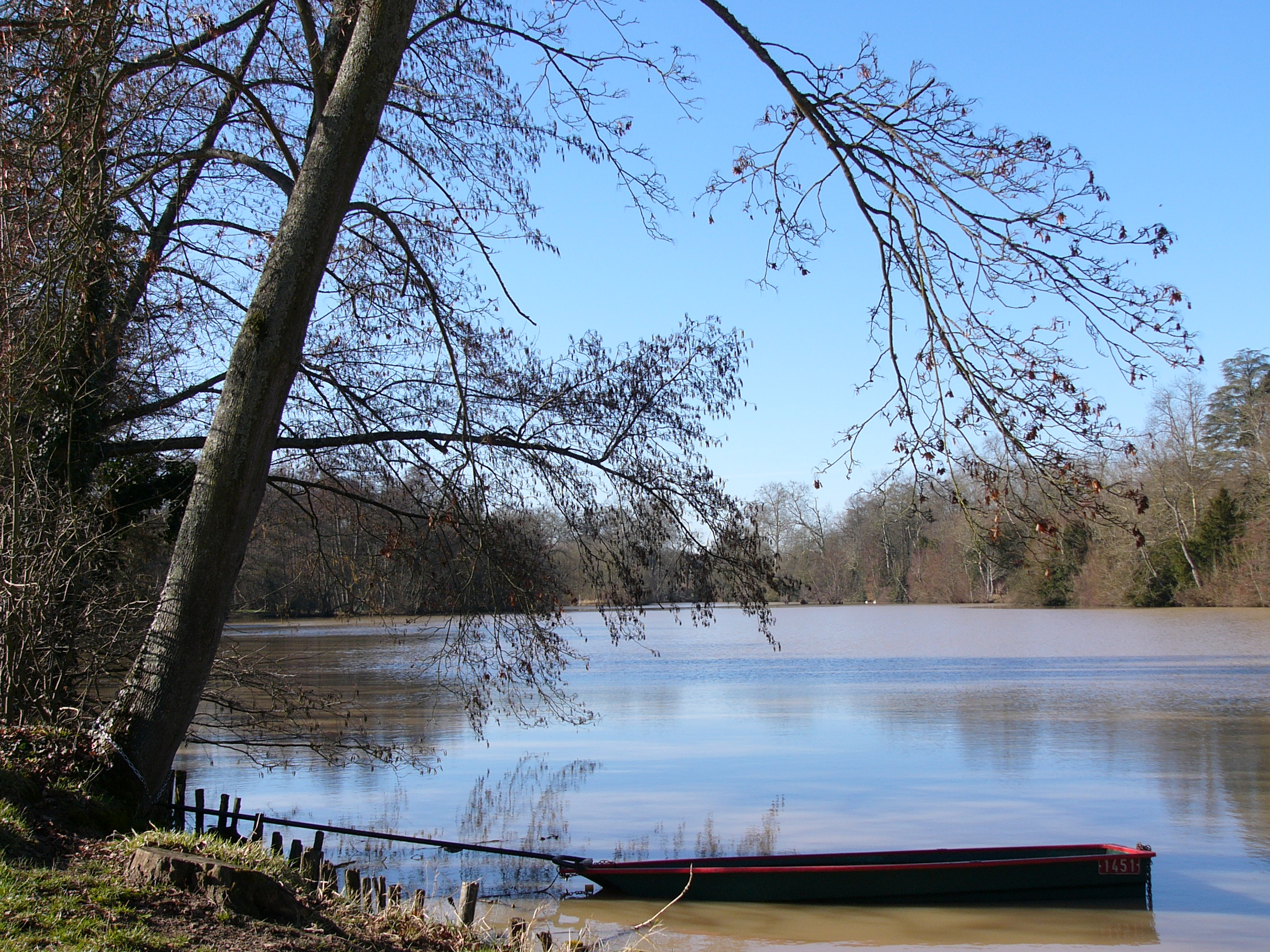 Le Loiret vu du sentier des Prés, Olivet, Loiret, France